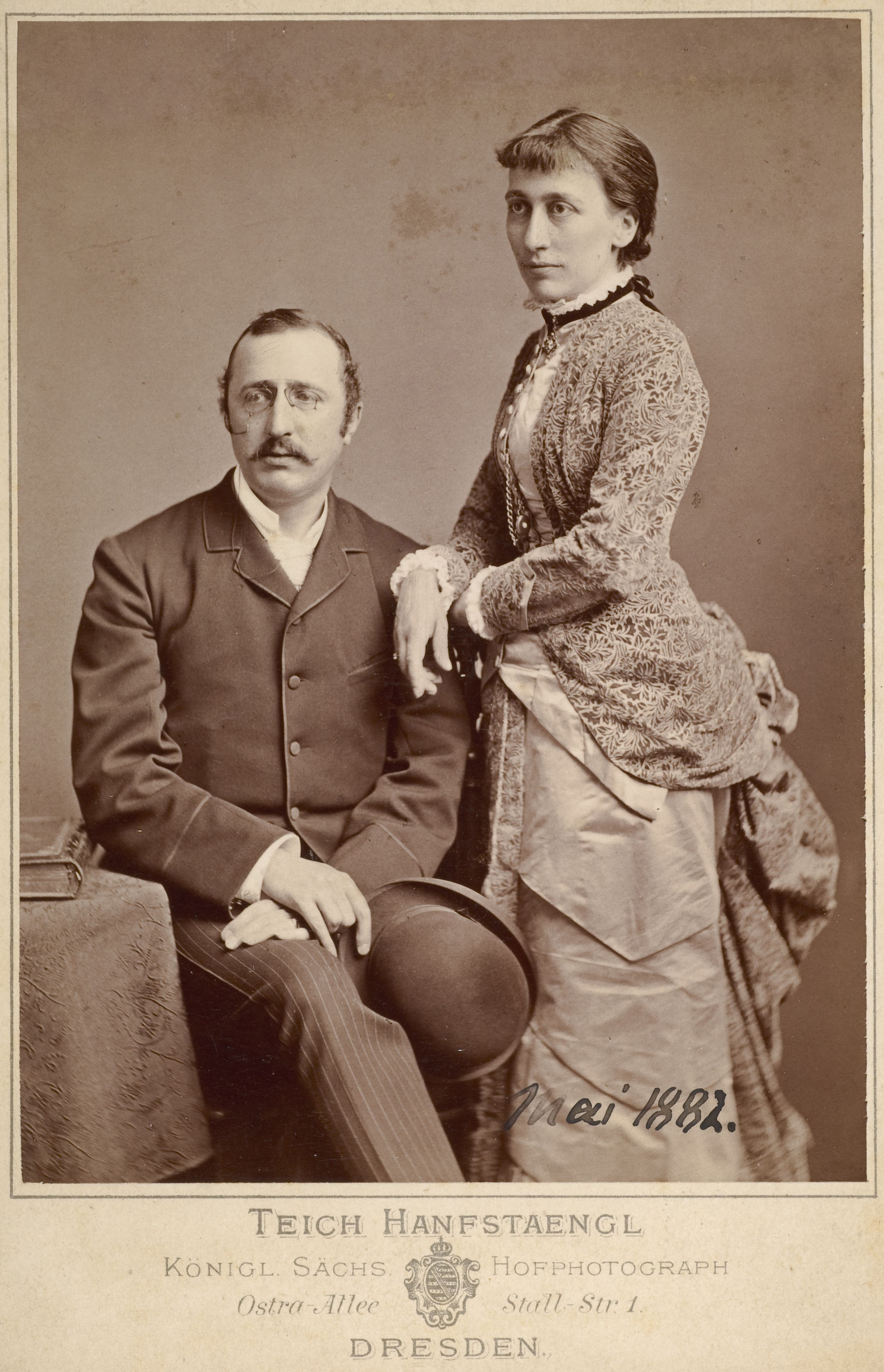 Friedrich Alfred Krupp e sua moglie, Margarethe von Ende, nel maggio 1882. (Foto dell'Atelier C. A. Teich (1851-1900) e Hanns Hanfstaengl, 1820–1895).